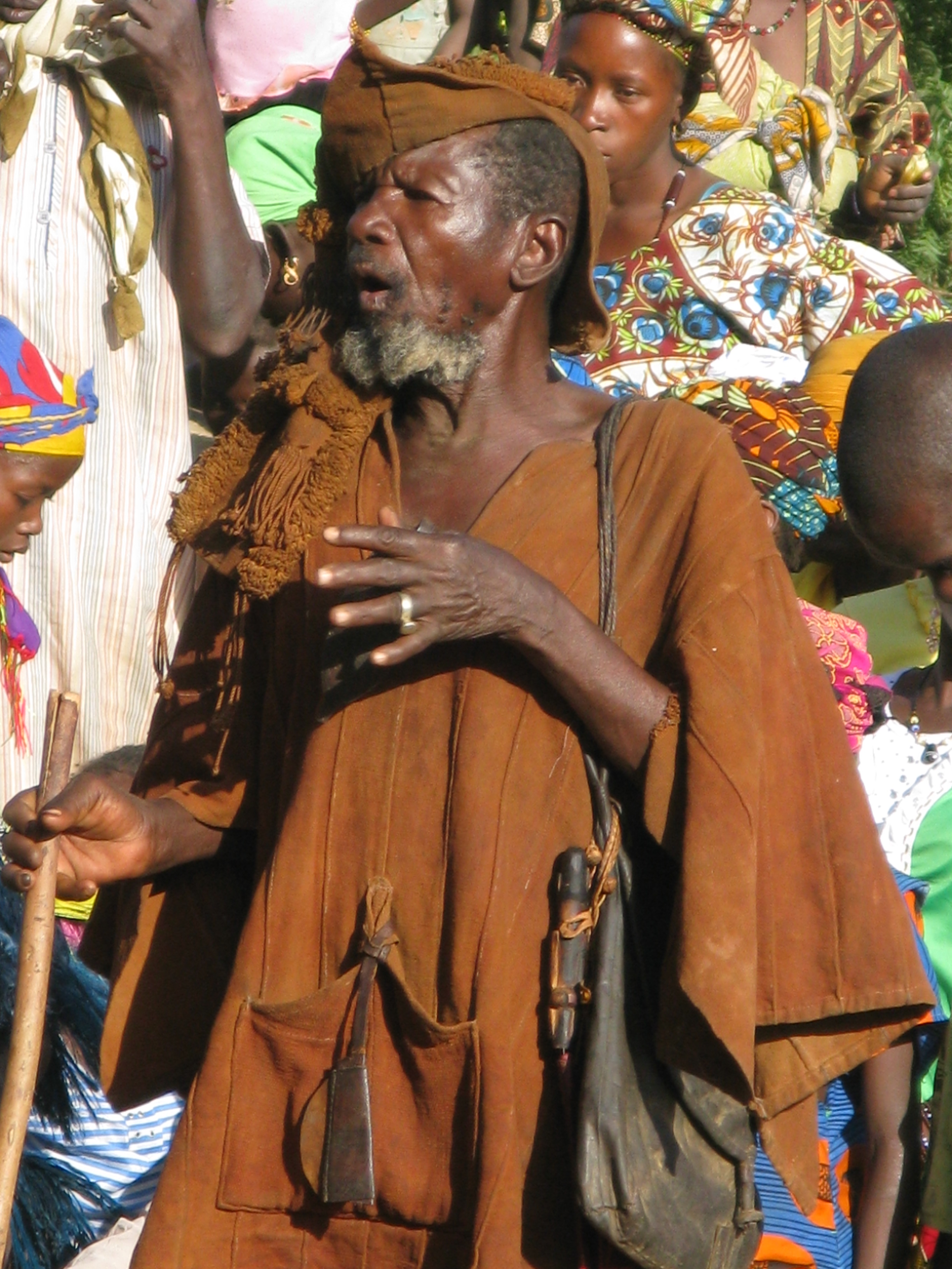 Griot This is an image of Cultural Fashion or Adornment from Mali